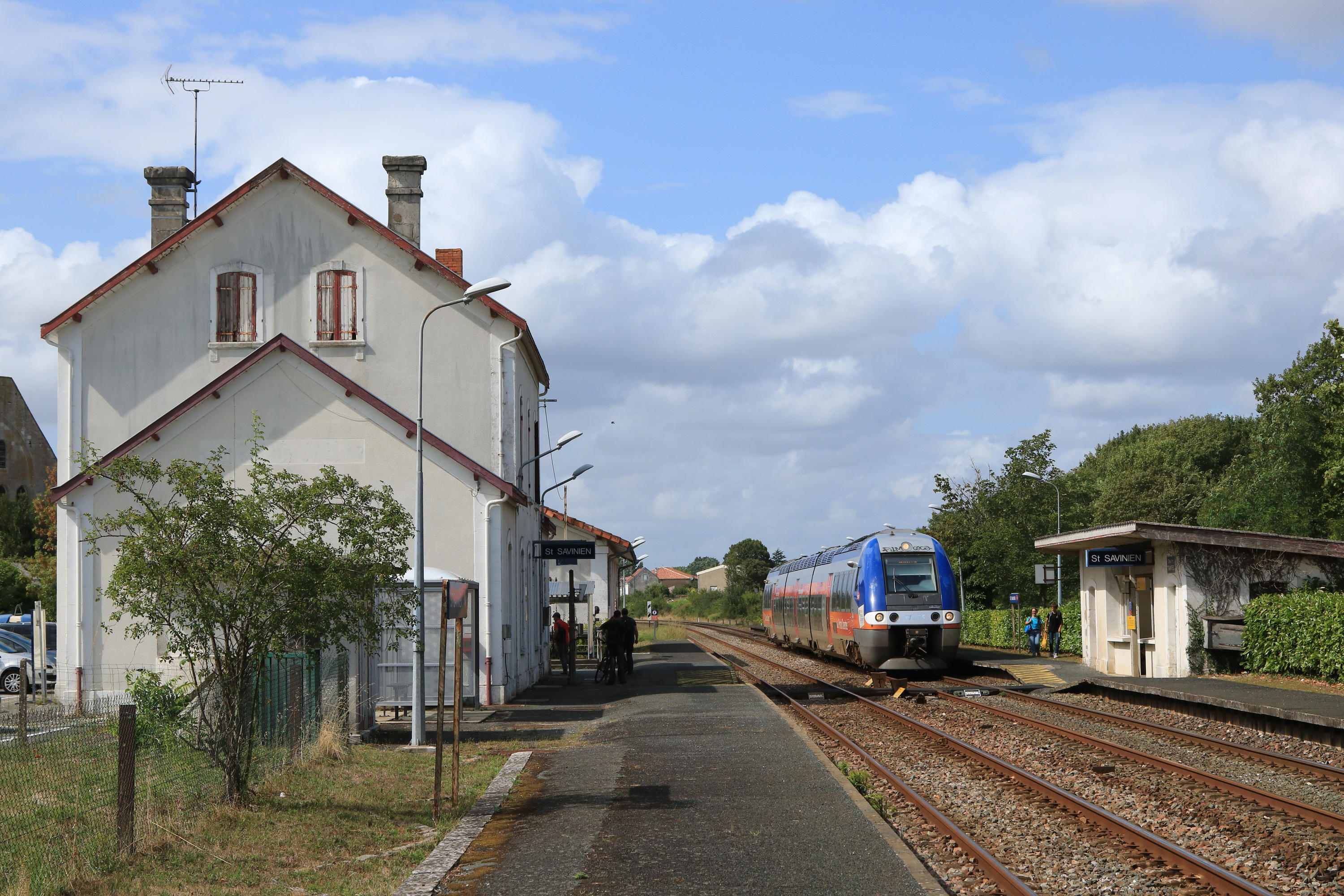 Le TER n° 864625 (La Rochelle-Ville - Saintes) assuré par le B 81665/6 dessert la gare de Saint-Savinien-sur-Charente.